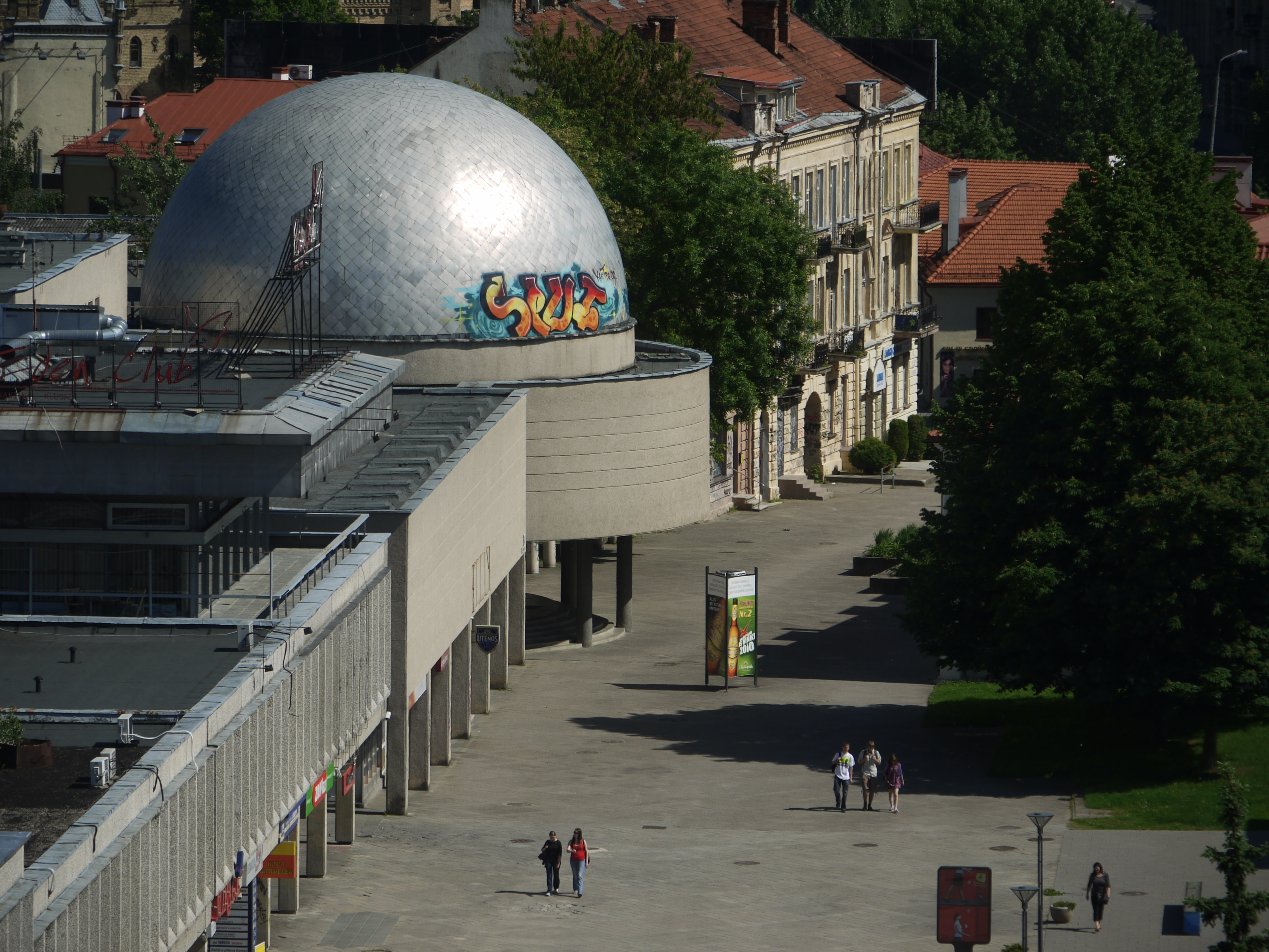 Planetarium